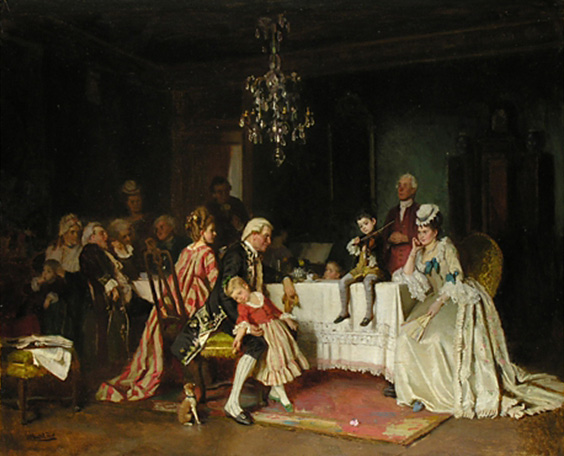 Das Wunderkind